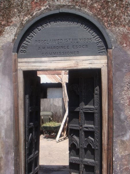 Fort Jesus à Mombasa - porte intérieure avec inscription en anglais